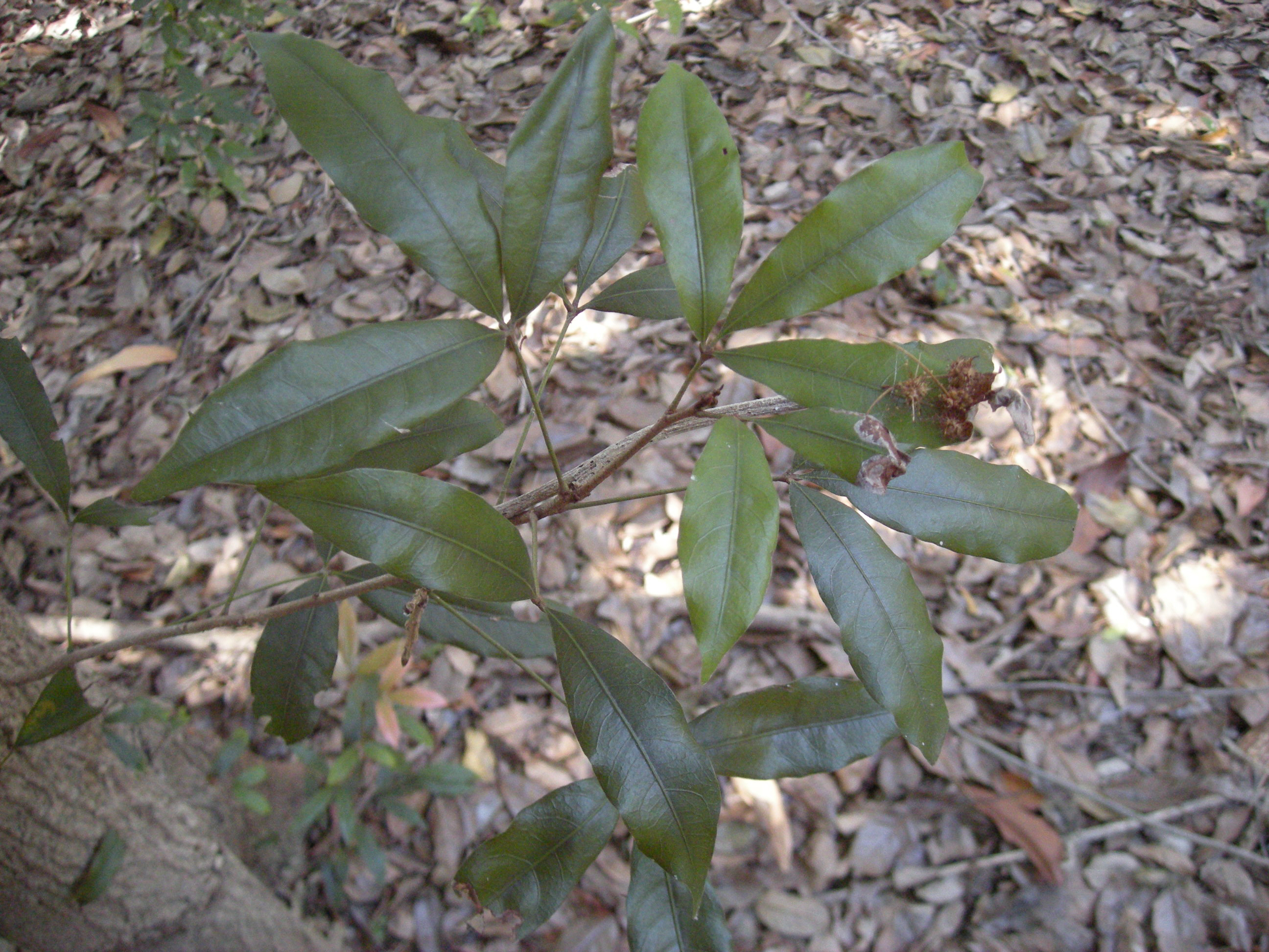 Argyrodendron trifoliatum foliage